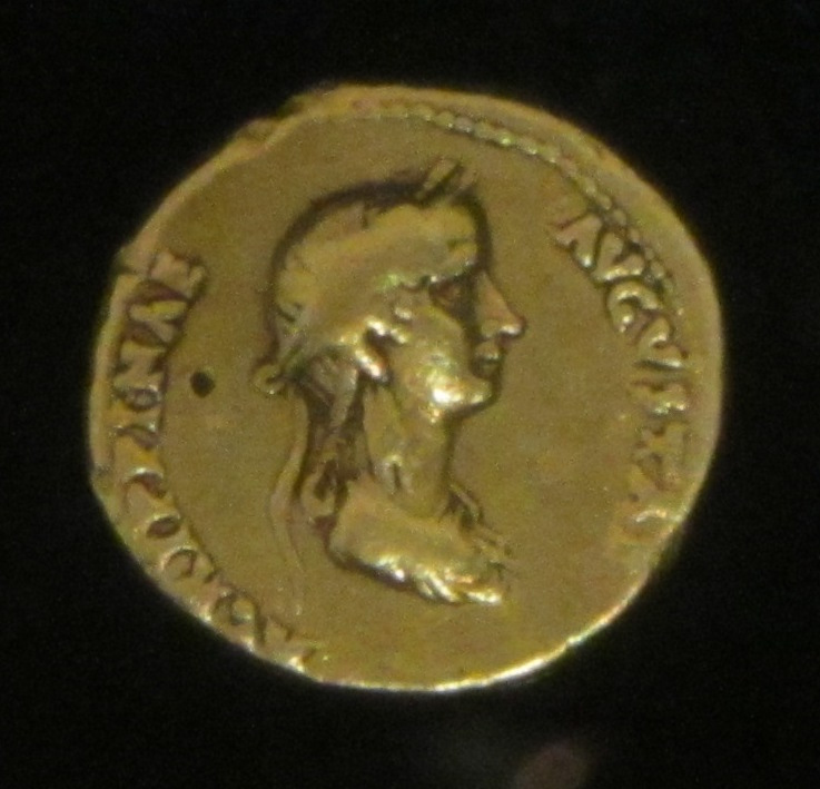 D/ TI CLAUD CAESAR AVG GERM P M TRIB POT P P Buste lauré de Claude R/ AGRIPPINAE/AUGUSTAE Buste d'Agrippine coiffée d'une couronne d'épis (symbole de fertilité) Musée des Beaux-Arts de Lyon, inv. X 618-12